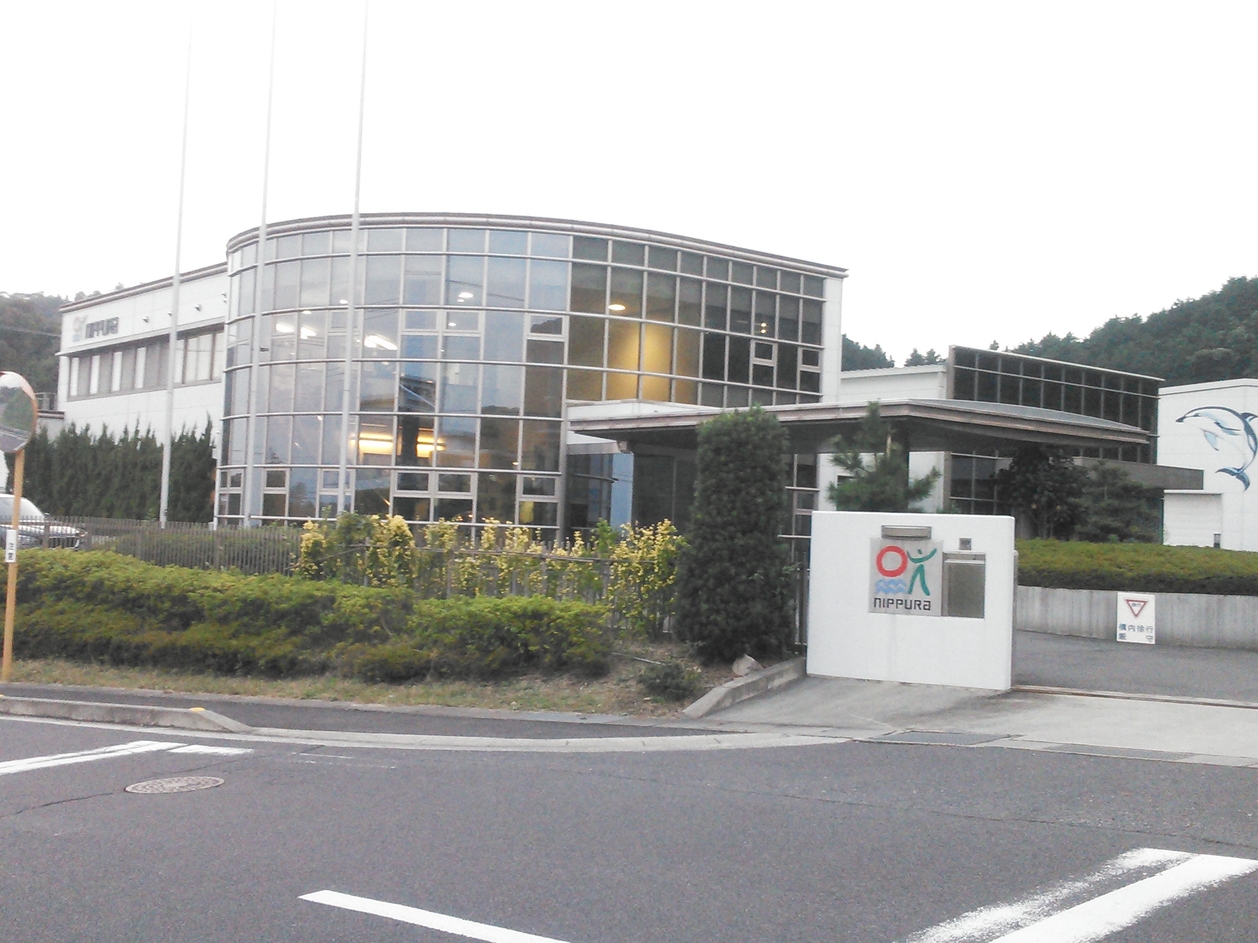 三木町・高松東ファクトリーパーク内、日プラ本社。投稿者による撮影。